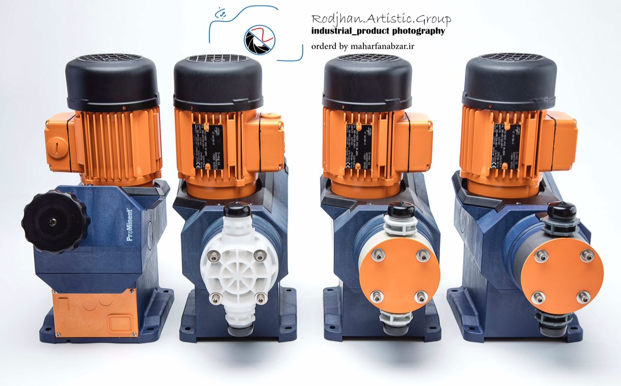 دوزینگ پمپ های الکتروموتوری را مشاهده می نمایید